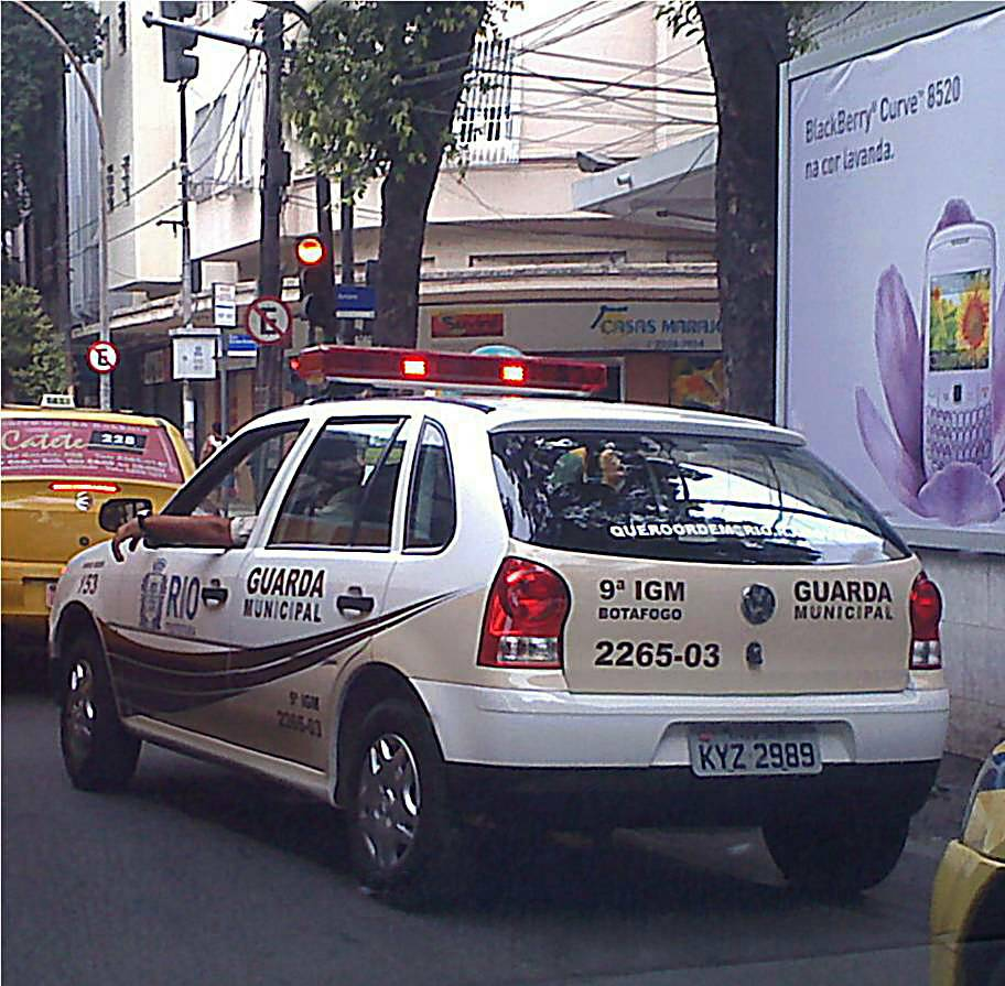 Veículo da Guarda Municipal da Cidade do Rio de Janeiro - Brasil